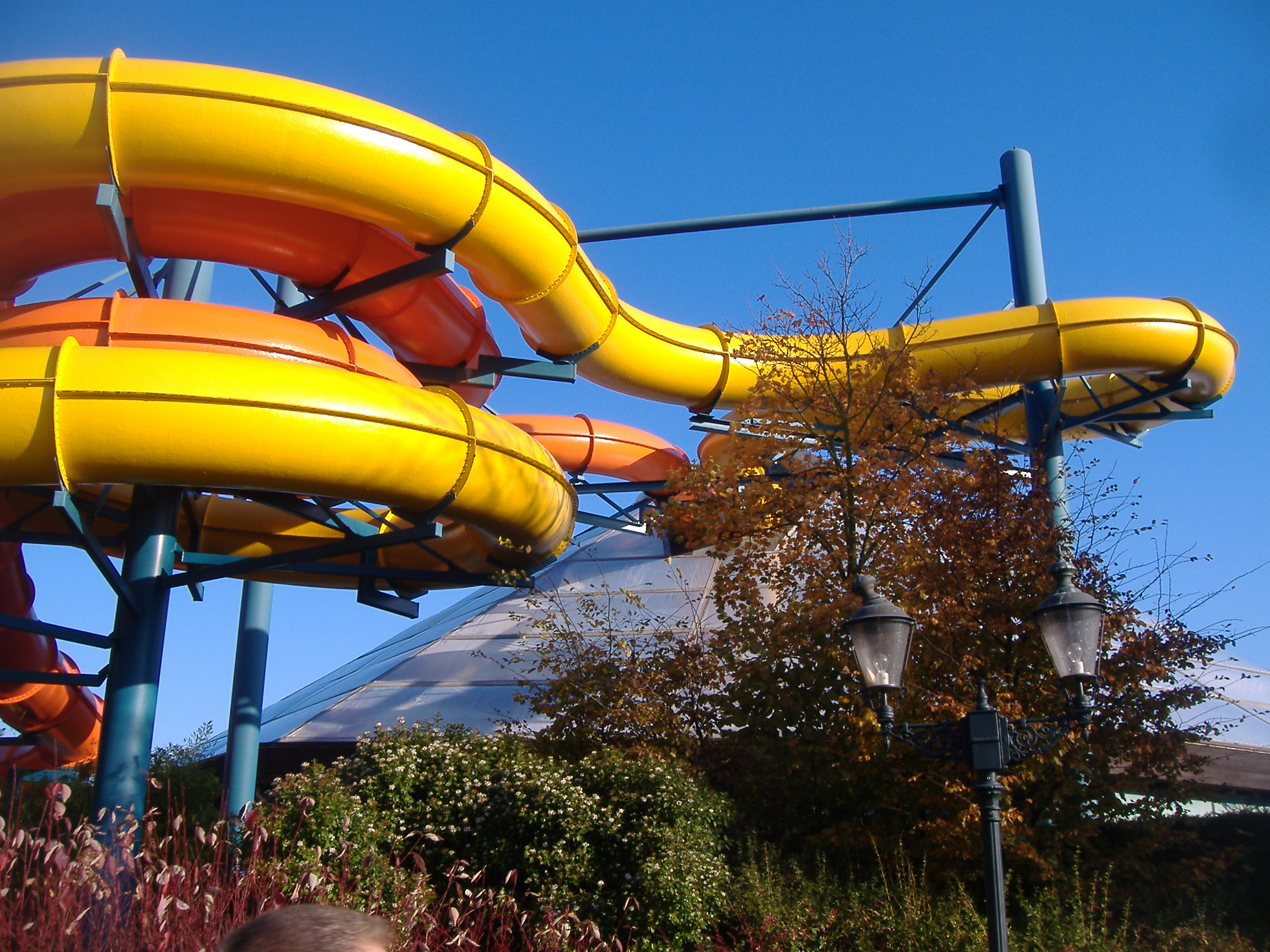 Les boas sont deux toboggans aquatiques situés à Aqualibi , Wavre , en Belgique .